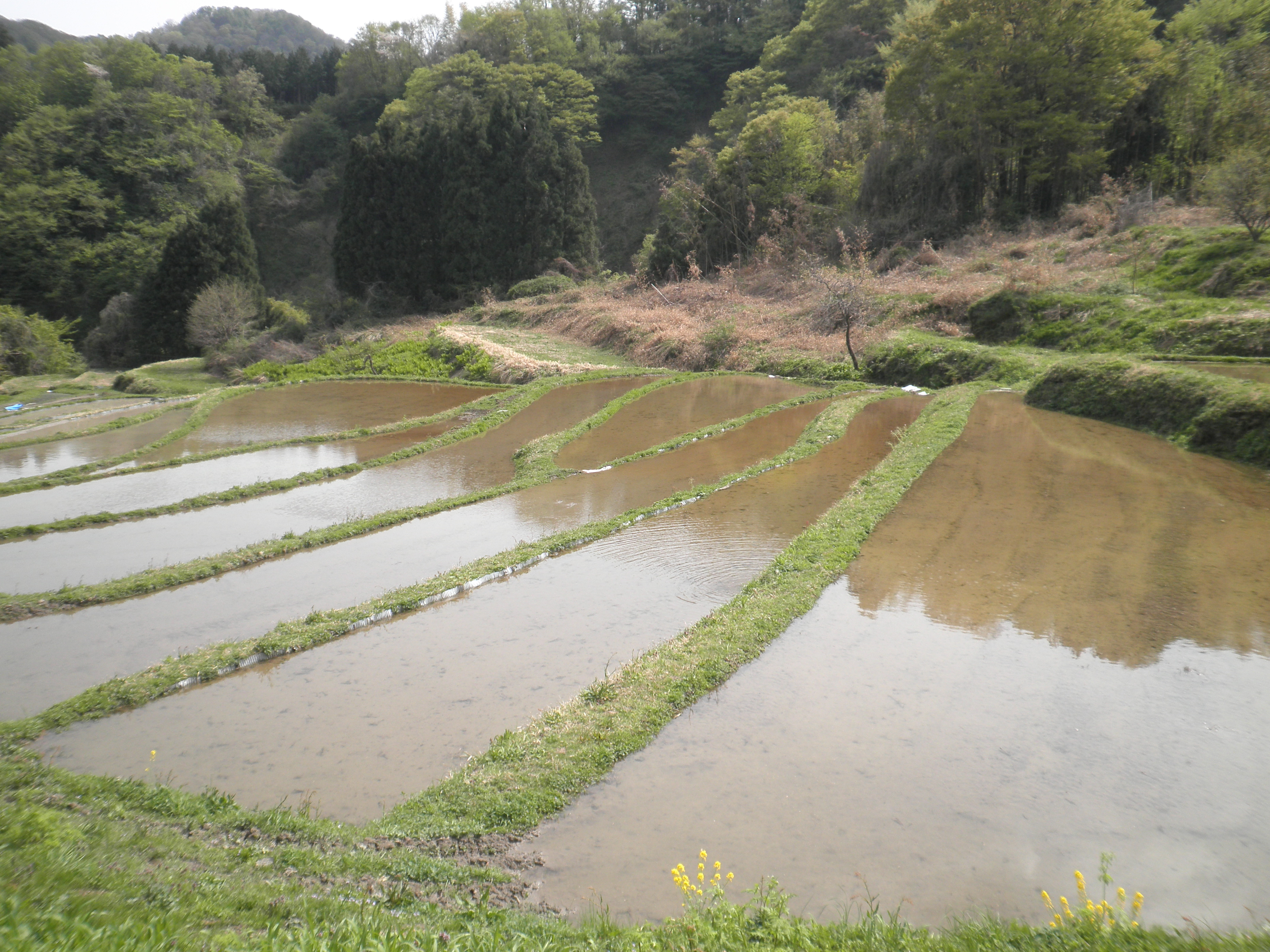 京都府ja:宮津市上世屋地区の棚田（田植え前の5月）